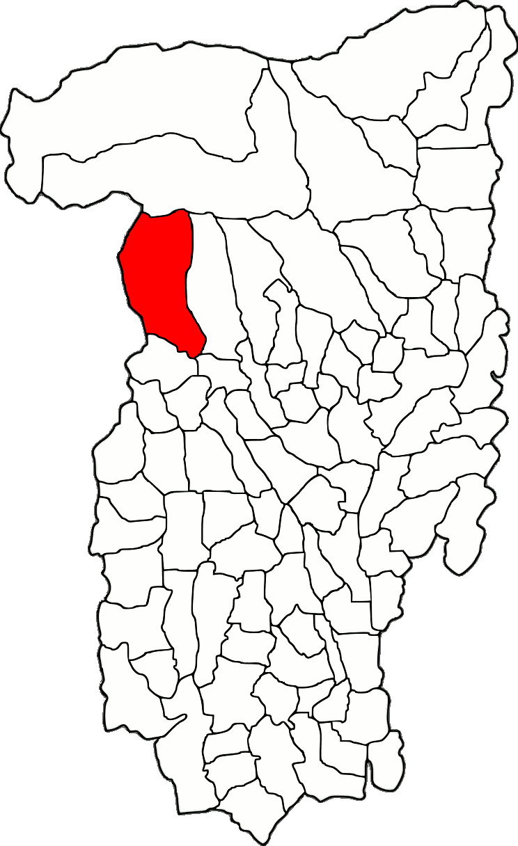 Lage der Gemeinde Vaideeni im Kreis Vâlcea (RO).